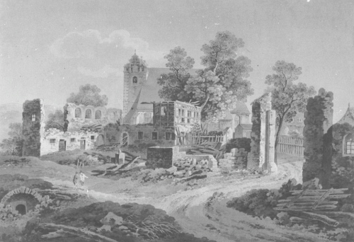 Kaditzer Linde